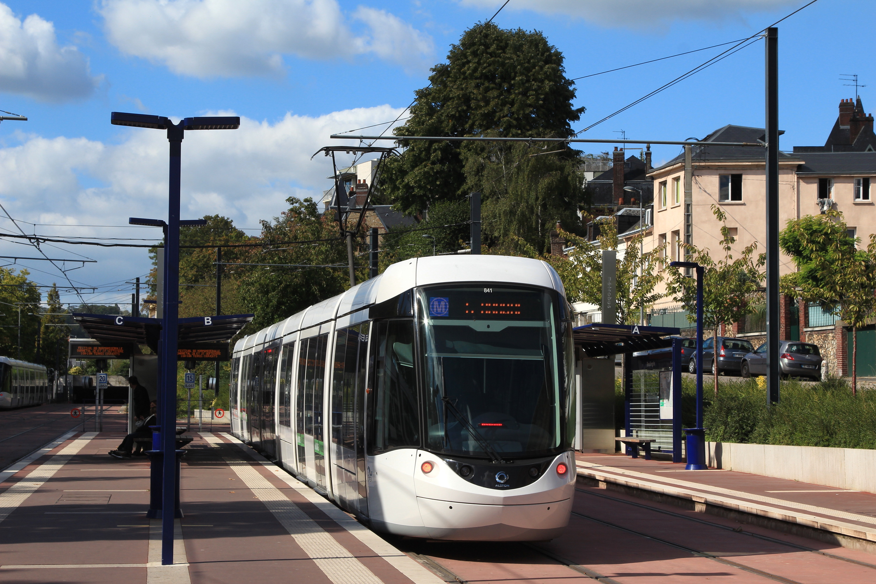 La rame Citadis n°841 du tramway (ou métro !) de Rouen à la station terminus Boulingrin.